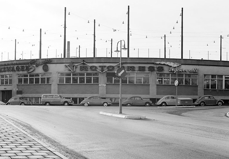 Tegelviksgatan mot hörnet Bondegatan och kv. Persikan med Spårvägens Söderhallen